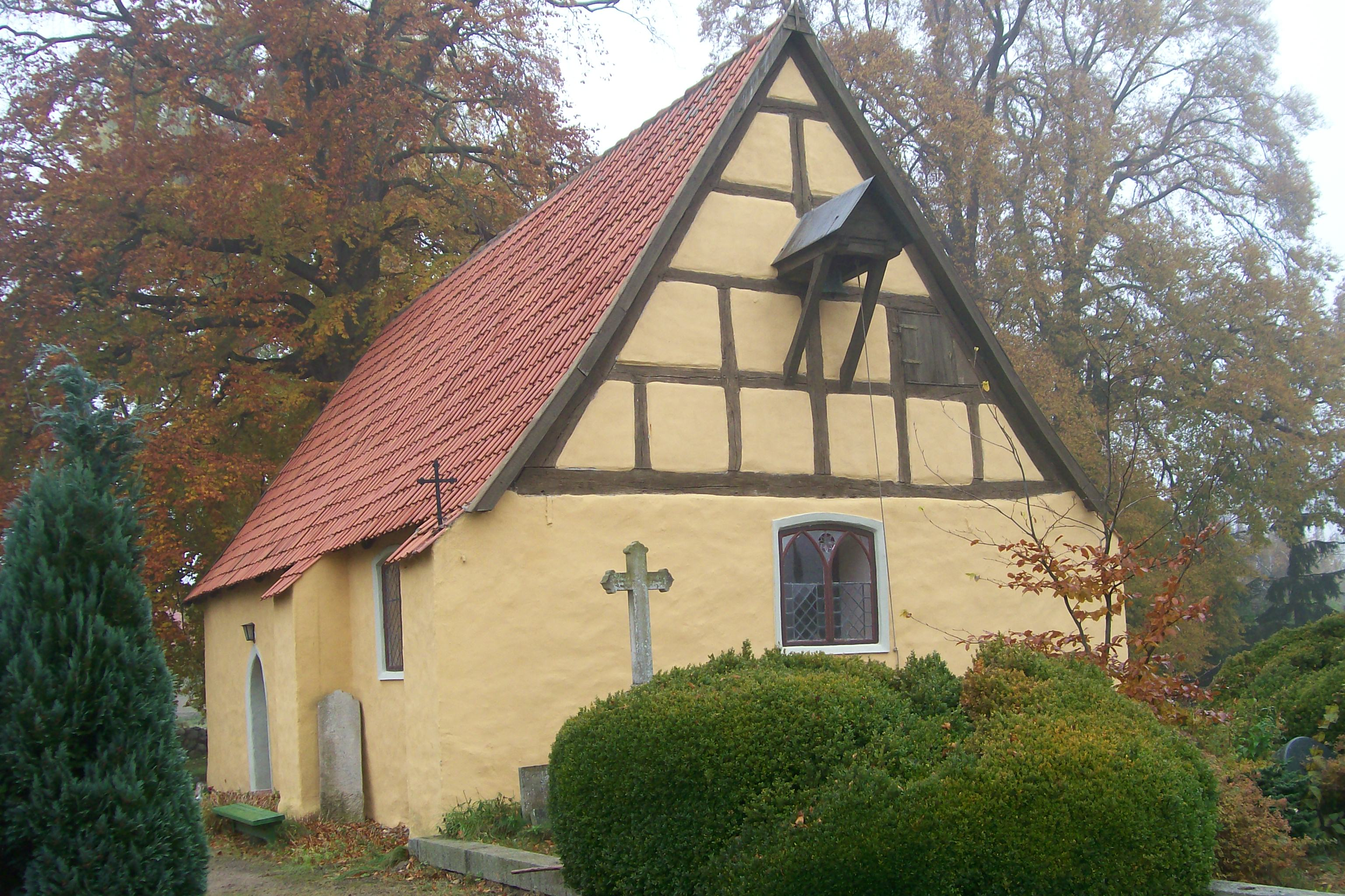 Kirche von Schloss Quitzin, erbaut 1614